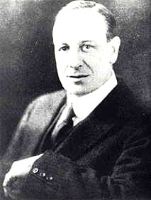 Charles Benjamin Collett, Eisenbahningenieur, 1871-1952